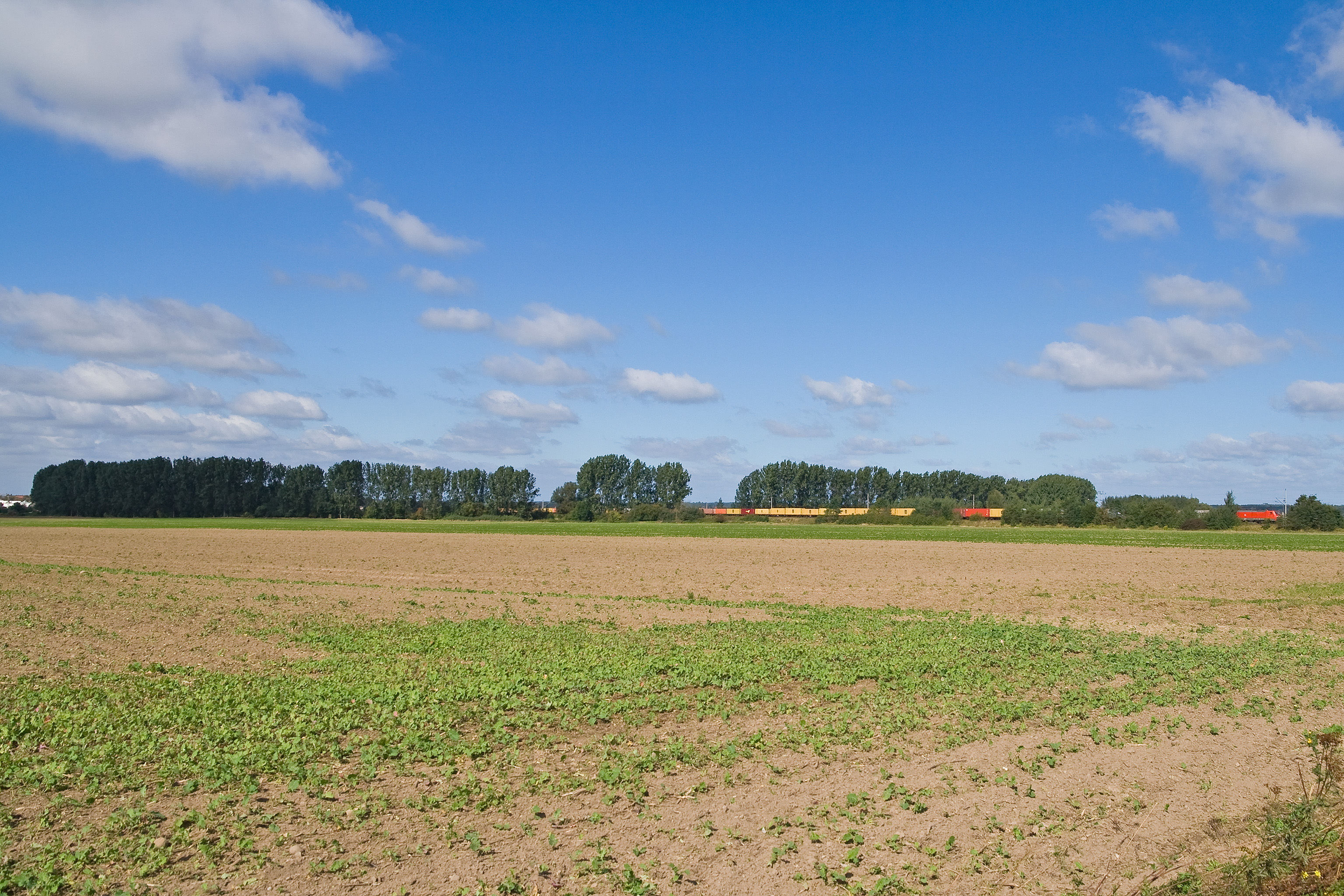 Die Baumreihe markiert die ehemalige neue Streckenführung der Bahnstrecke Salzwedel–Lüchow unter der Amerikalinie hindurch. Auf der Amerikalinie verkehrt ein Güterzug Richtung Stendal.